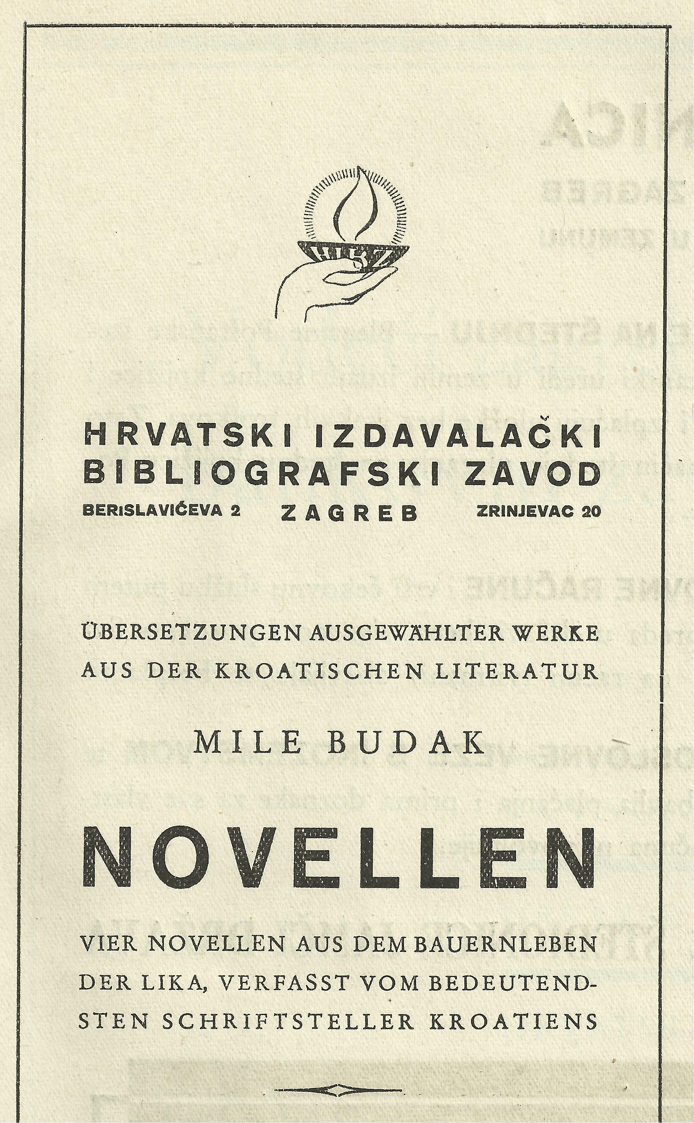 Verlagsanzeige des Kroatischen bibilgraphischen Verlagsinstitutes für das deutschsprachige Buch "Novellen" von Mile Budak aus dem Jahr 1942